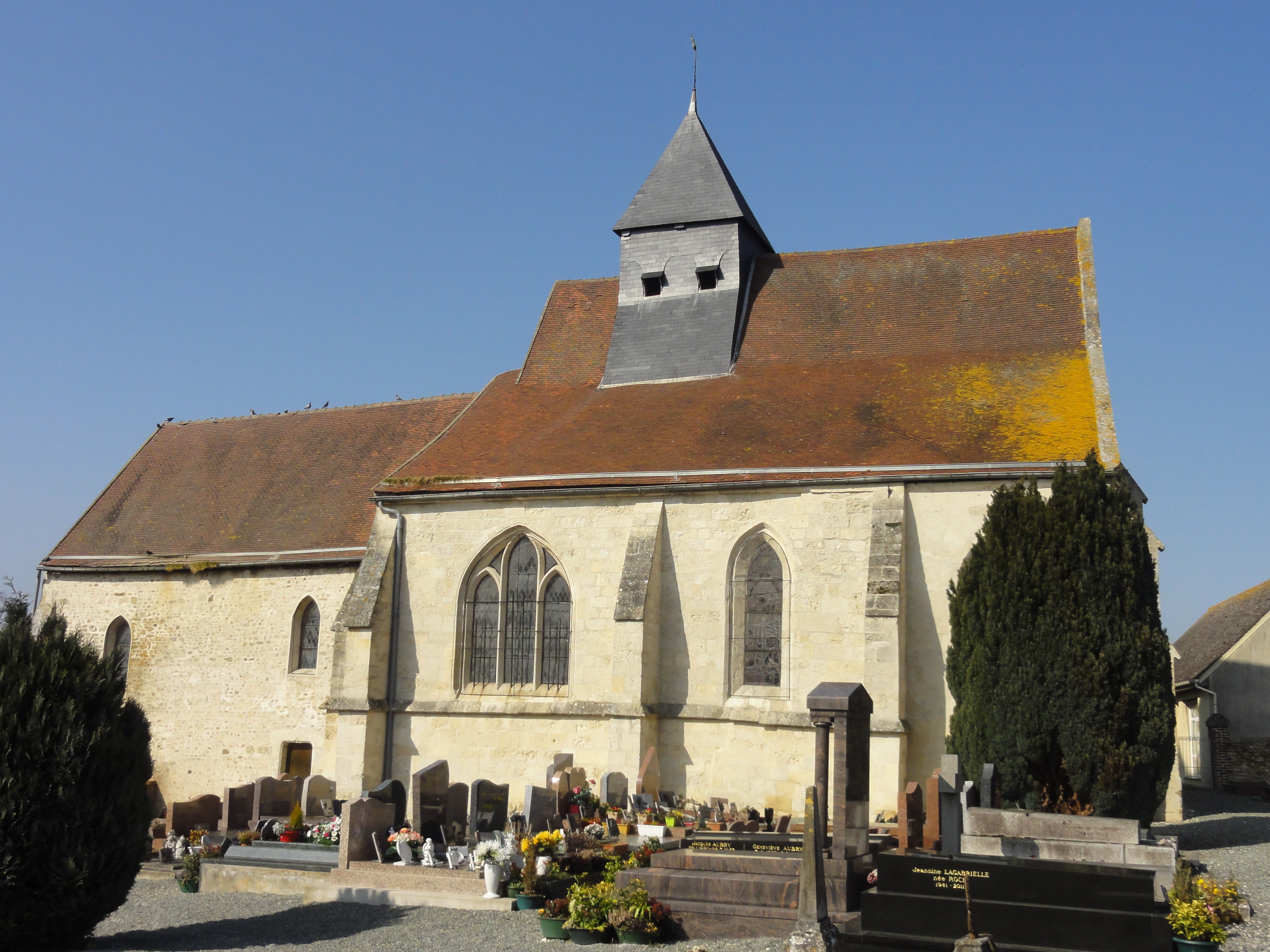 Église Saint-Martin de Belle-Église - voir titre.